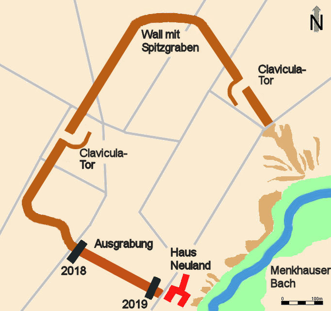 Lageskizze des Römerlager Bielefeld, Details nicht maßstabsgetreu, wie Tore, Wallstärke, Grabungsschnitte, Bach